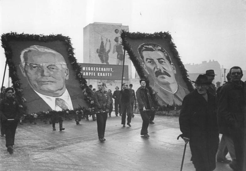 Nationales Aufbau-Programm - Grundsteinlegung am 1. Wohnbaublock. Am 3. Februar 1952, dem Jahrestag des amerikanischen Terrorangriffs auf Berlin, fand am Block E-Süd die Grundsteinlegung für den 1. Wohnbau statt. UBz: Während der Demonstration der Aufbauhelfer zum Block E-Süd. Illus Köhler-3.2.52 Gesperrt